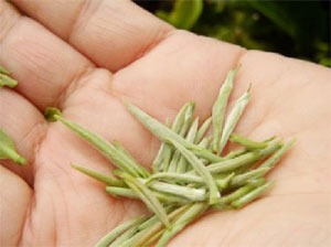 ยอดชาขาว